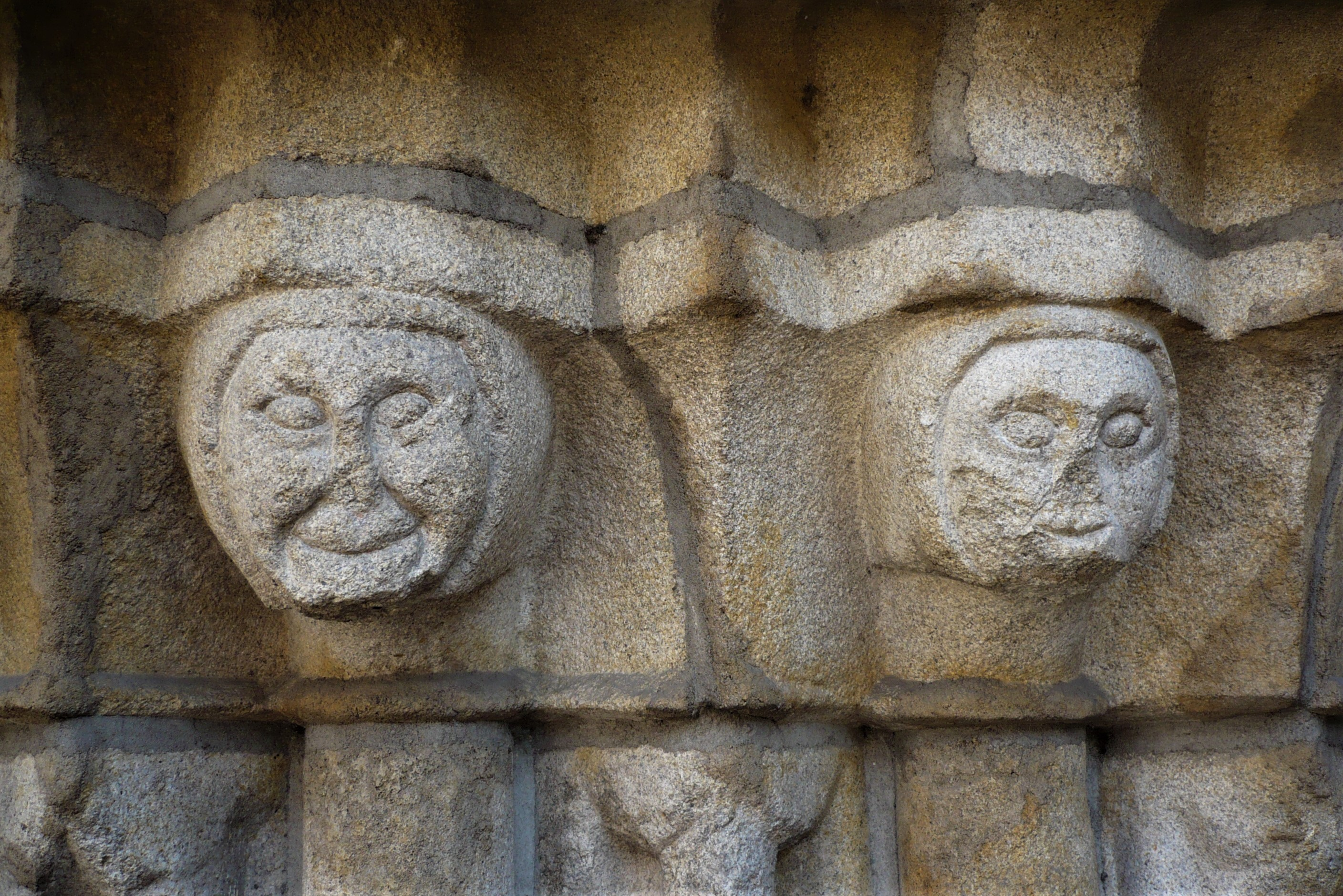 Głuchołazy. Kościół św. Wawrzyńca